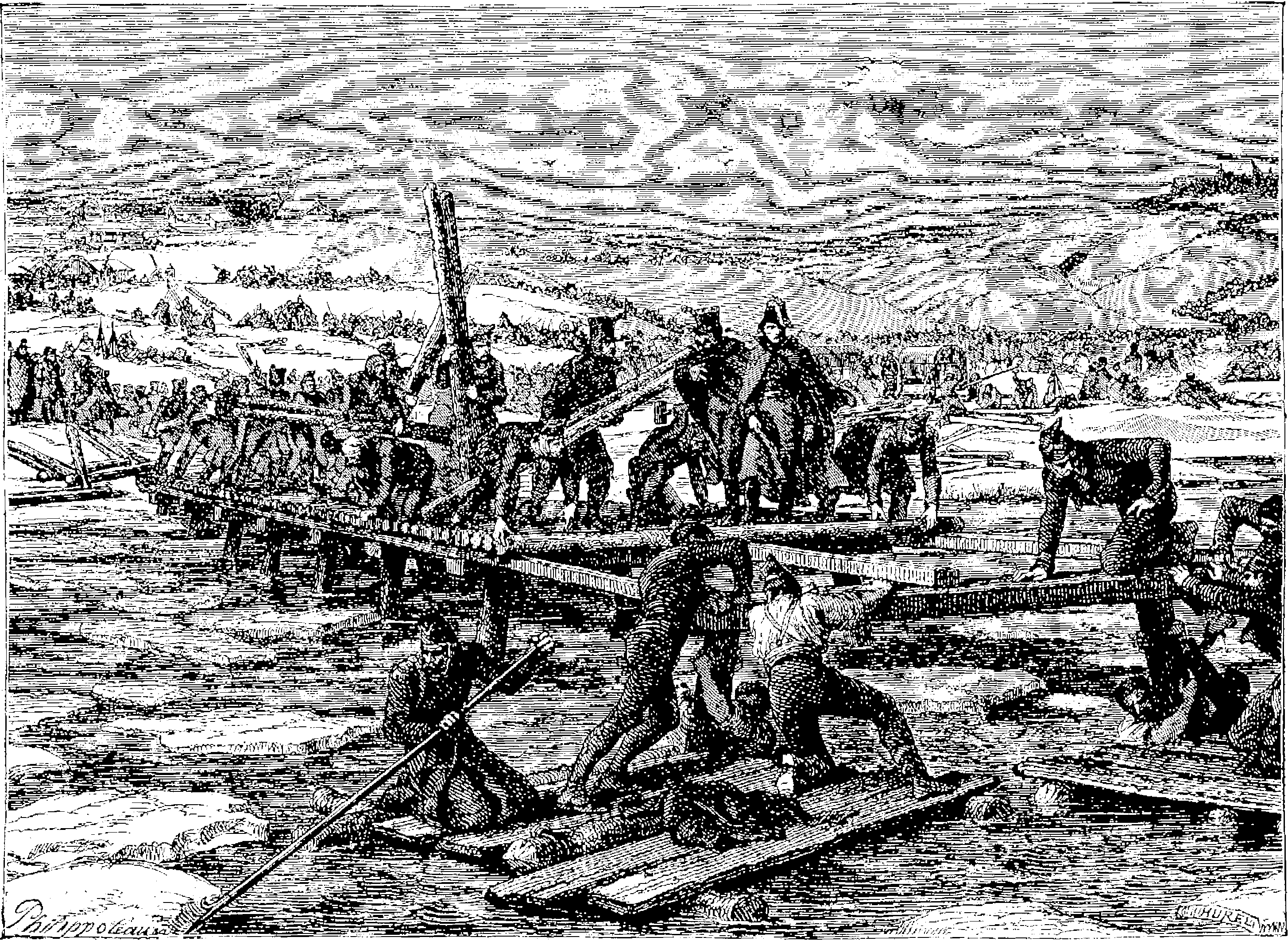 Les pontonniers de la Grande Armée au passage de la Bérésina